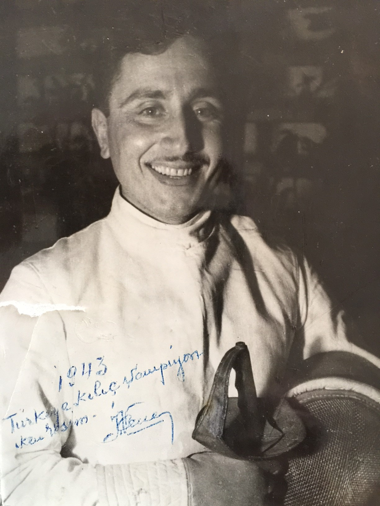 İlhami ÇENE-1943 Türkiye Kılıç Şampiyonu